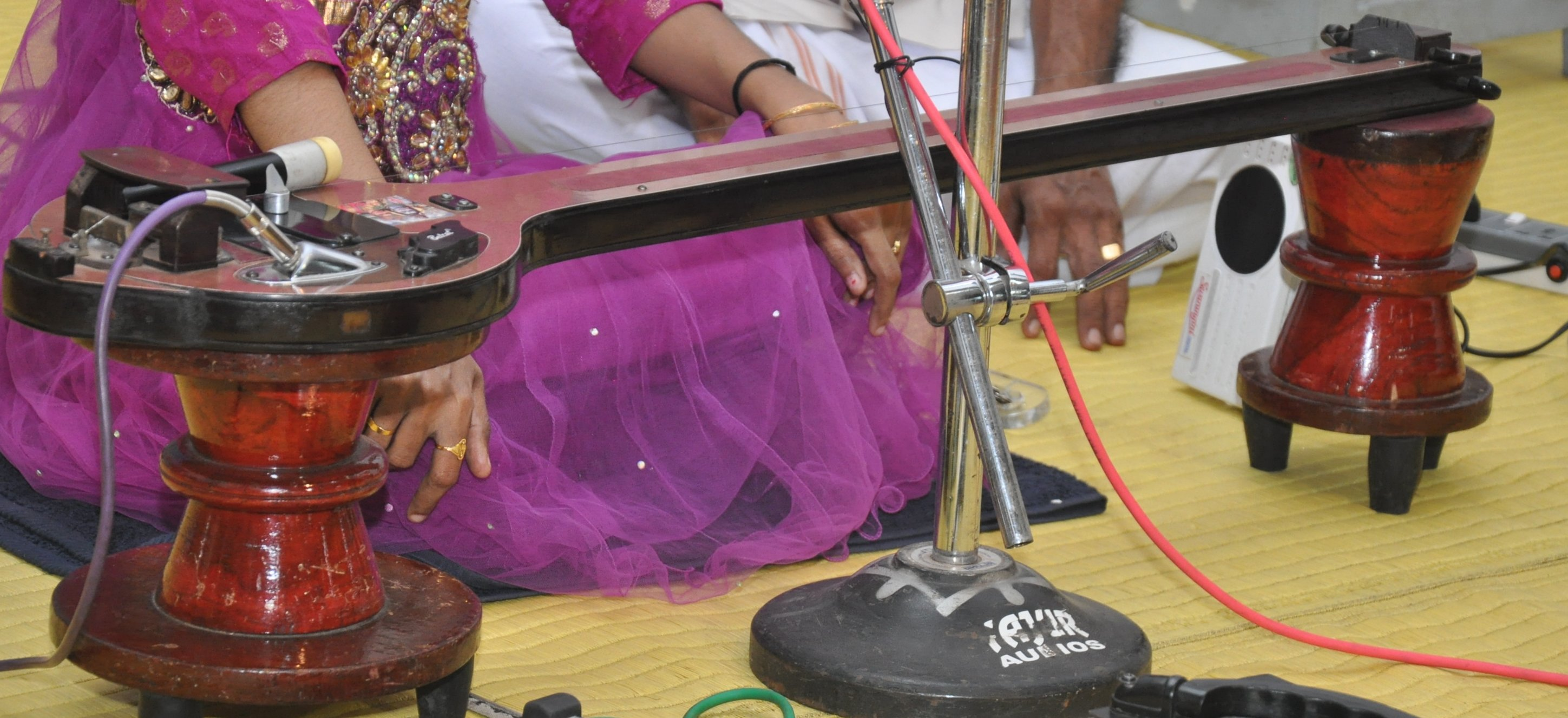 ഗായത്രിവീണ